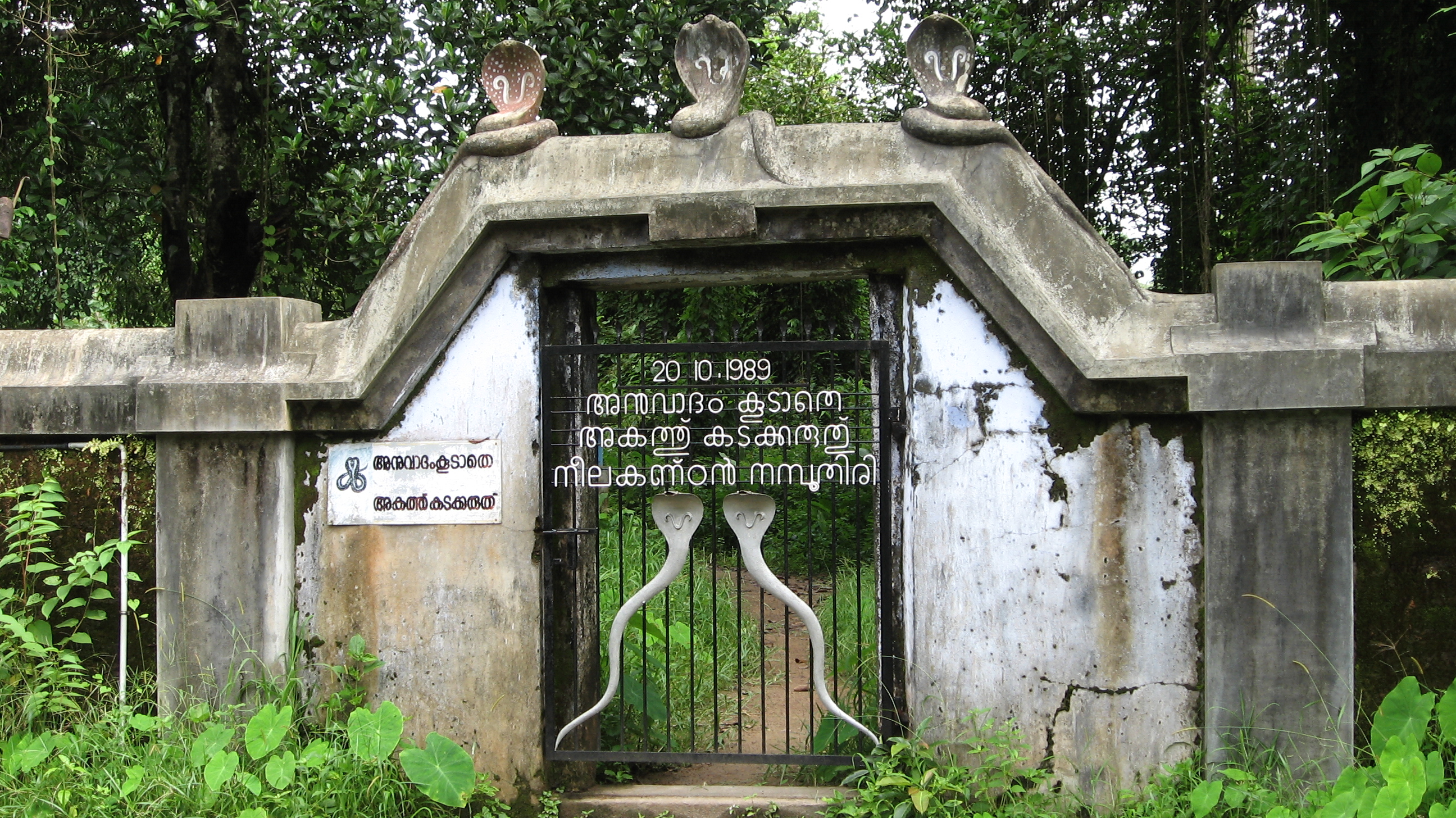 കിഴക്കെ കാവ്